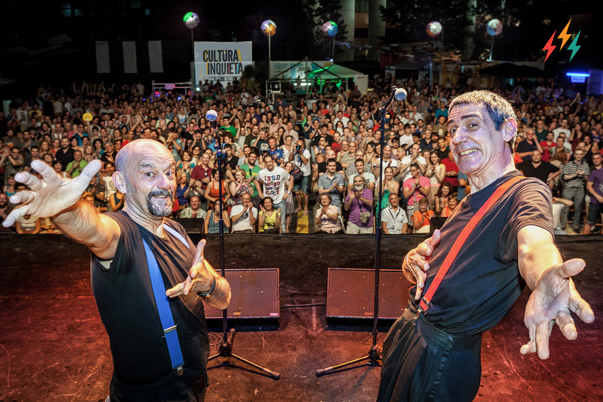 Actuación de Faemino y Cansado en el Festival Cultura Inquieta